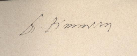 Dr. Sigmund Zimmern, Domkapitular Speyer, eigenhändiger Besitzervermerk in einem alten Buch.